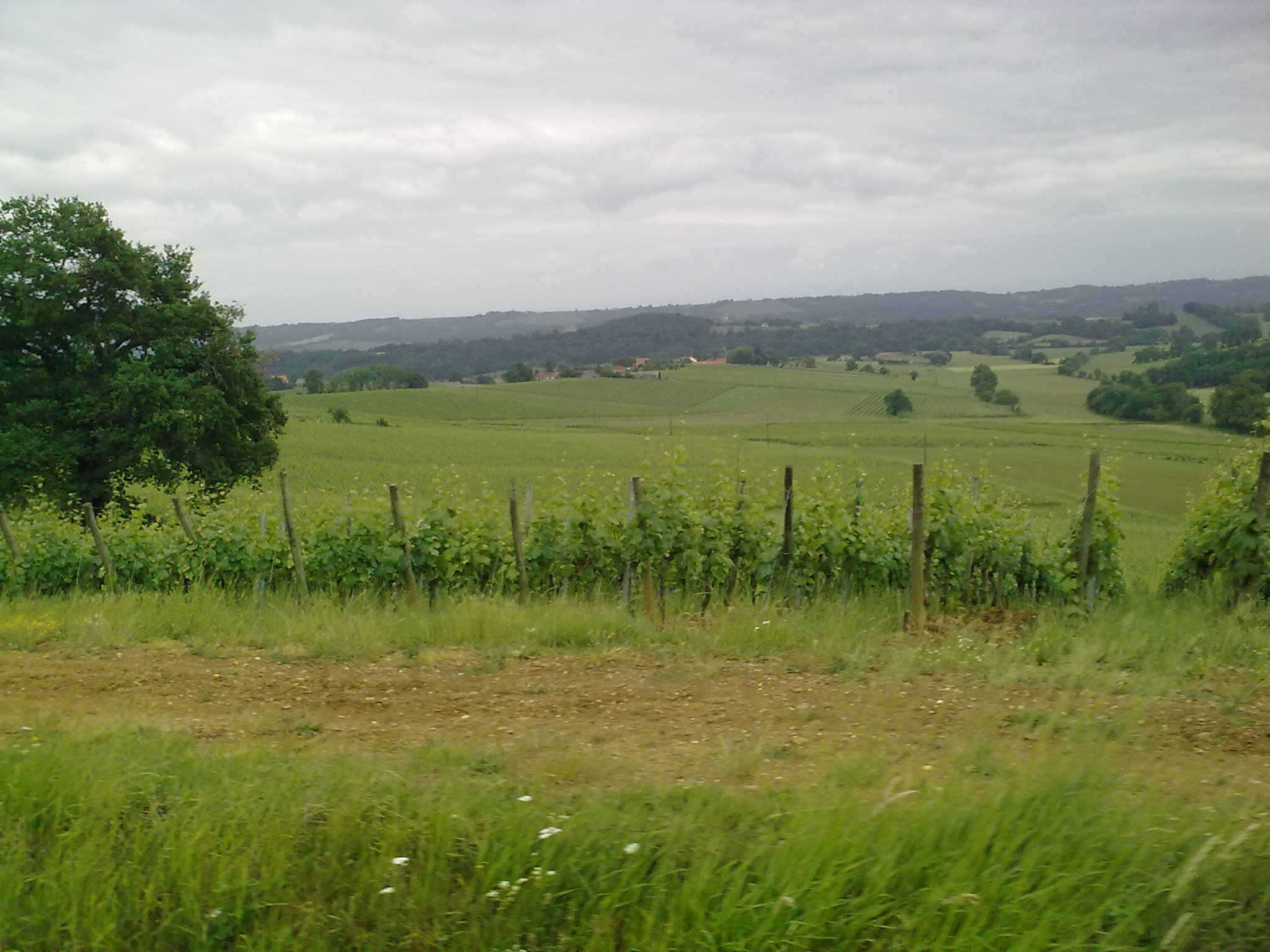 Aydie